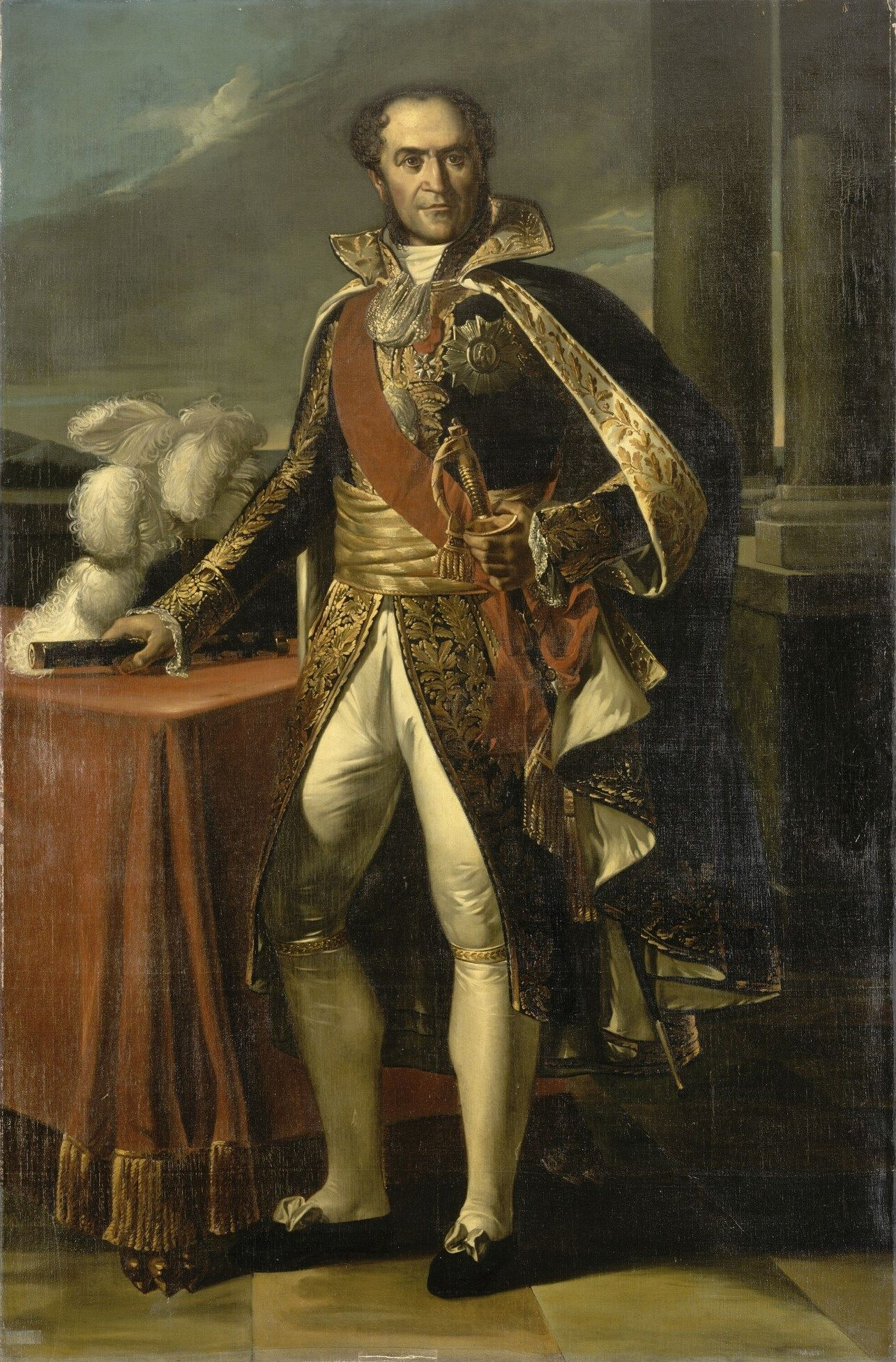 Copie d'après un original de madame Benoist commandé par Napoléon Ier pour la salle des maréchaux du palais des Tuileries à Paris, détruit dans l'incendie de 1871